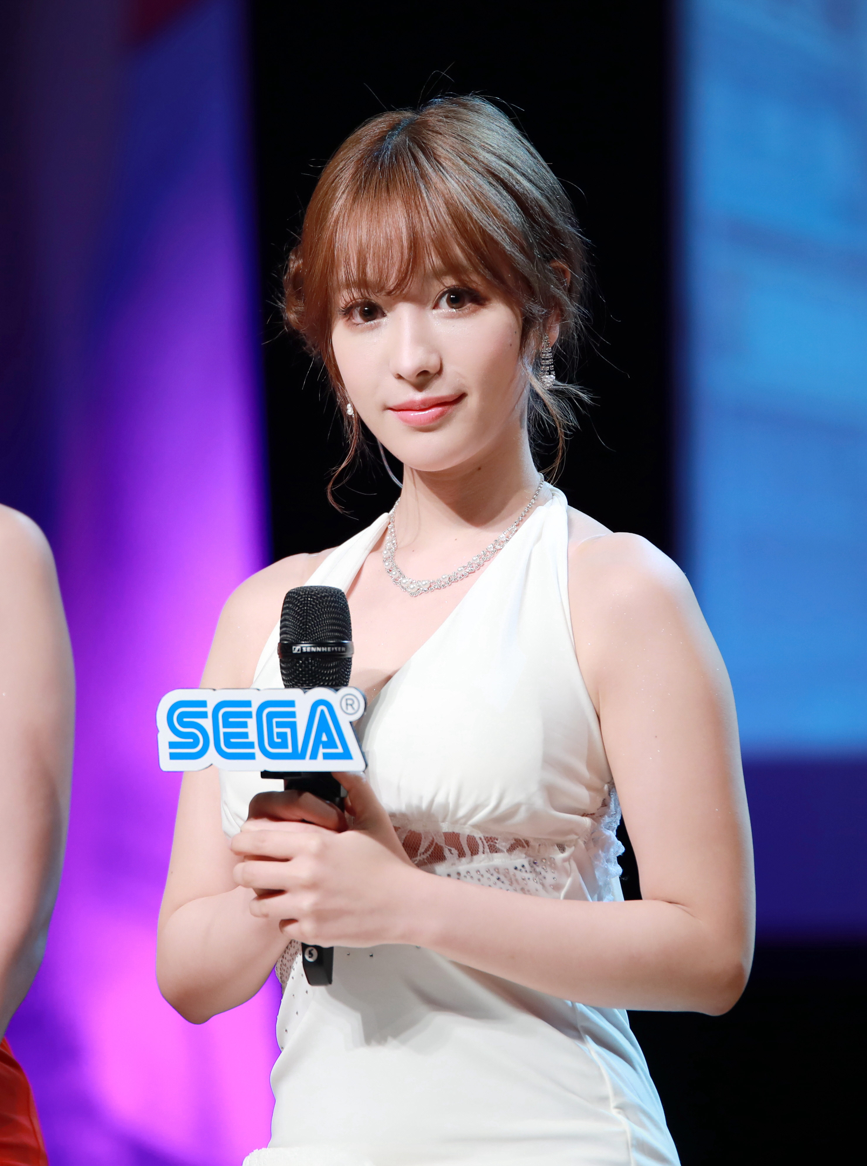 180727 龍が如く3 ファン会議2 桃乃木かな